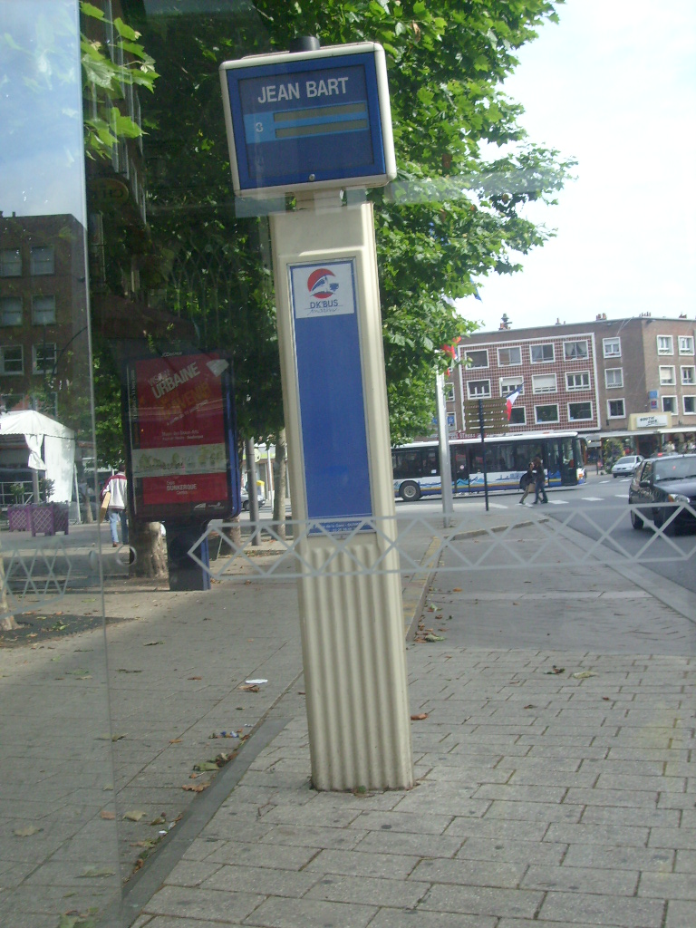 SAEIV de Dk'Bus Place Jean Bart